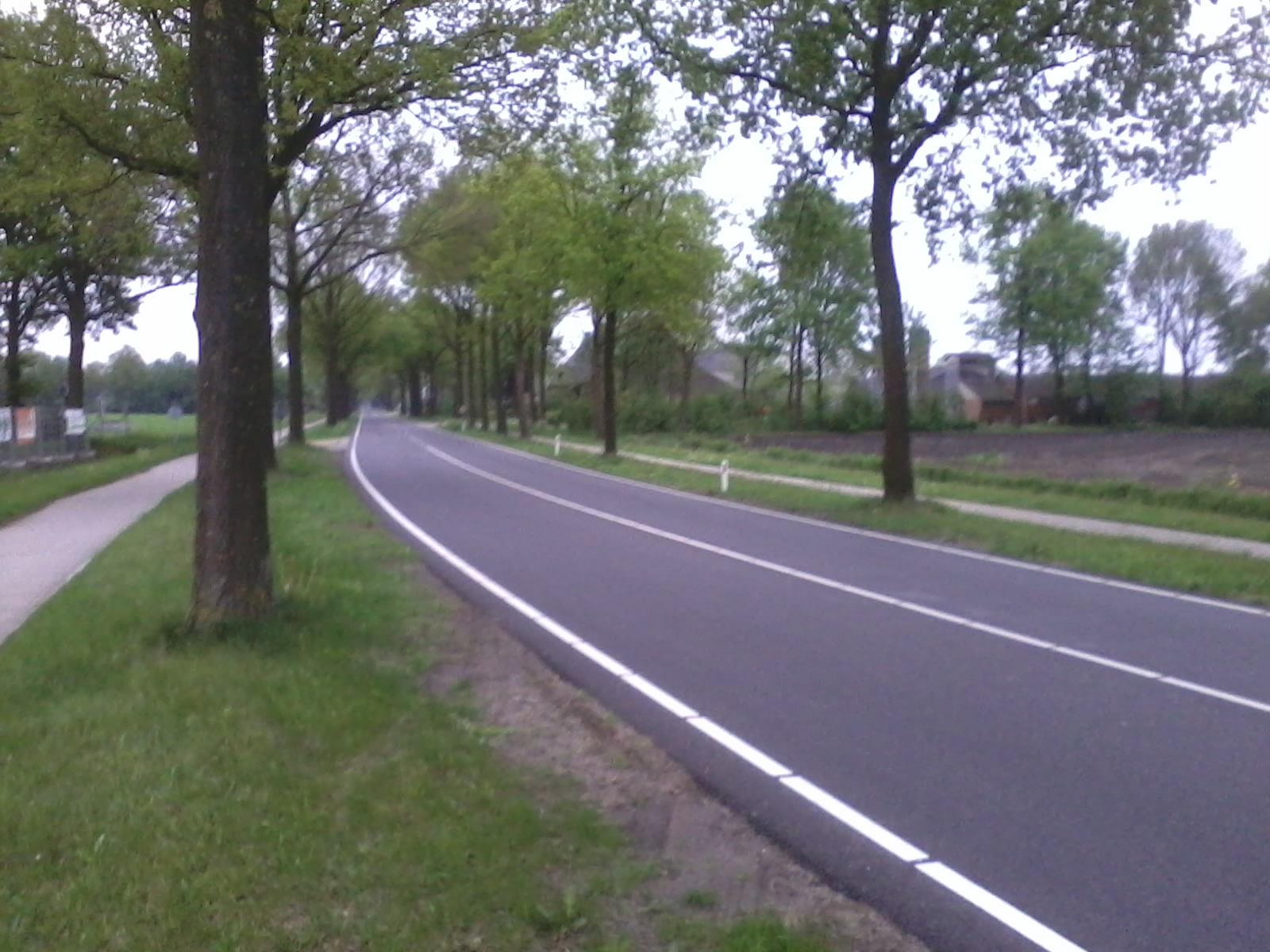 Het vernieuwde gedeelte van de N604 van Deurne naar de bebouwdekom van Bakel